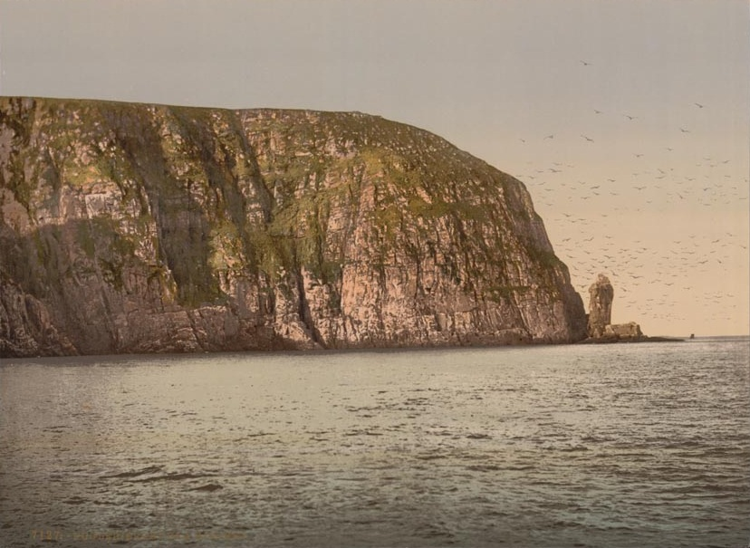 Near Hjelmso Fuglebjerget Norway